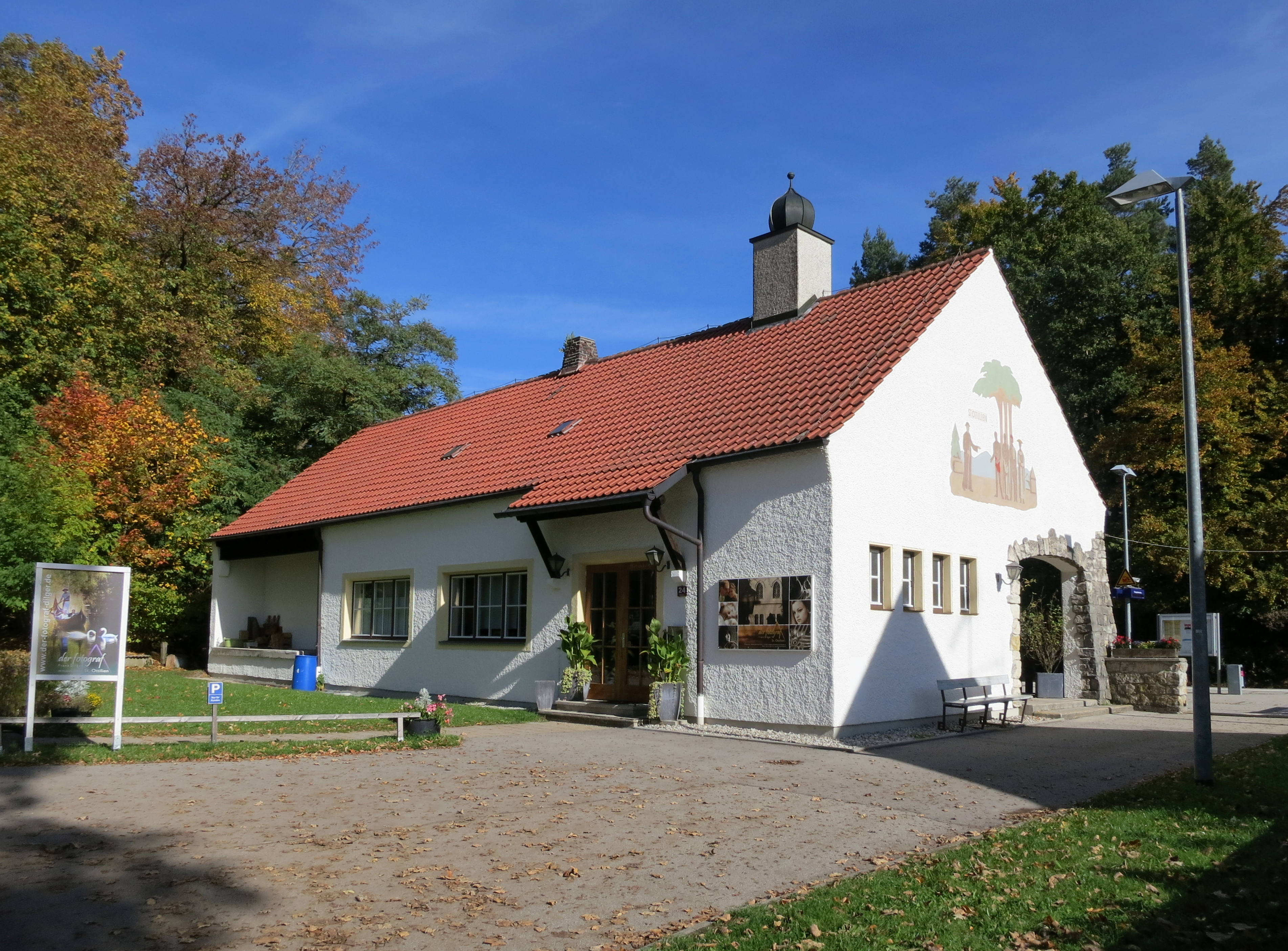 Empfangsgebäude des Bahnhofs St. Ottilien von der Straßenseite